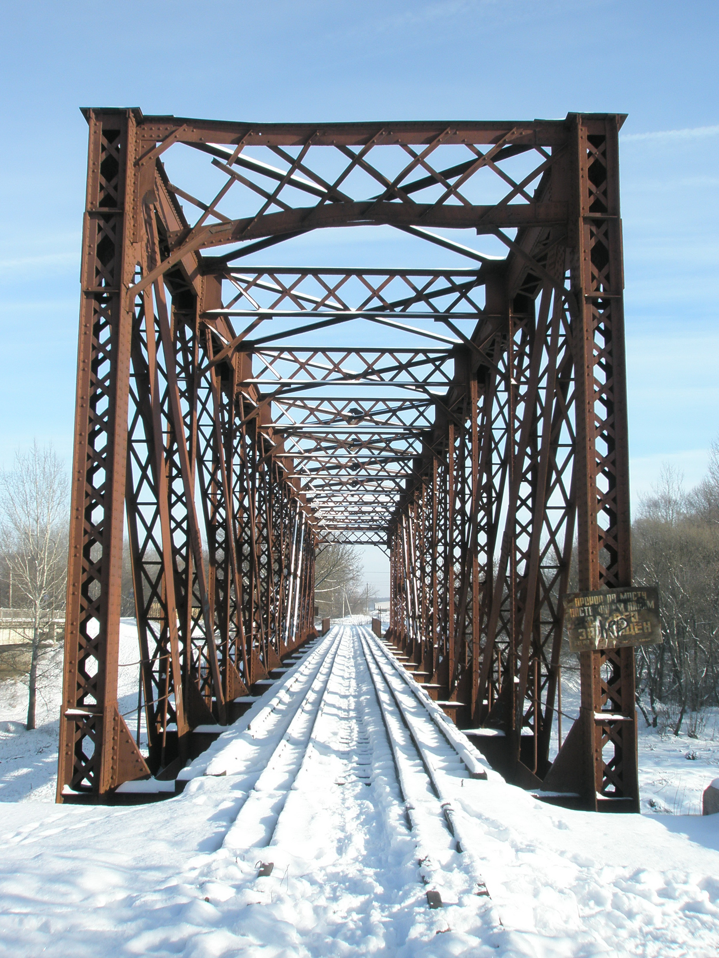 Железнодорожный мост Курской городской ветви через протоку Кривец (3-й мост). Современное состояние